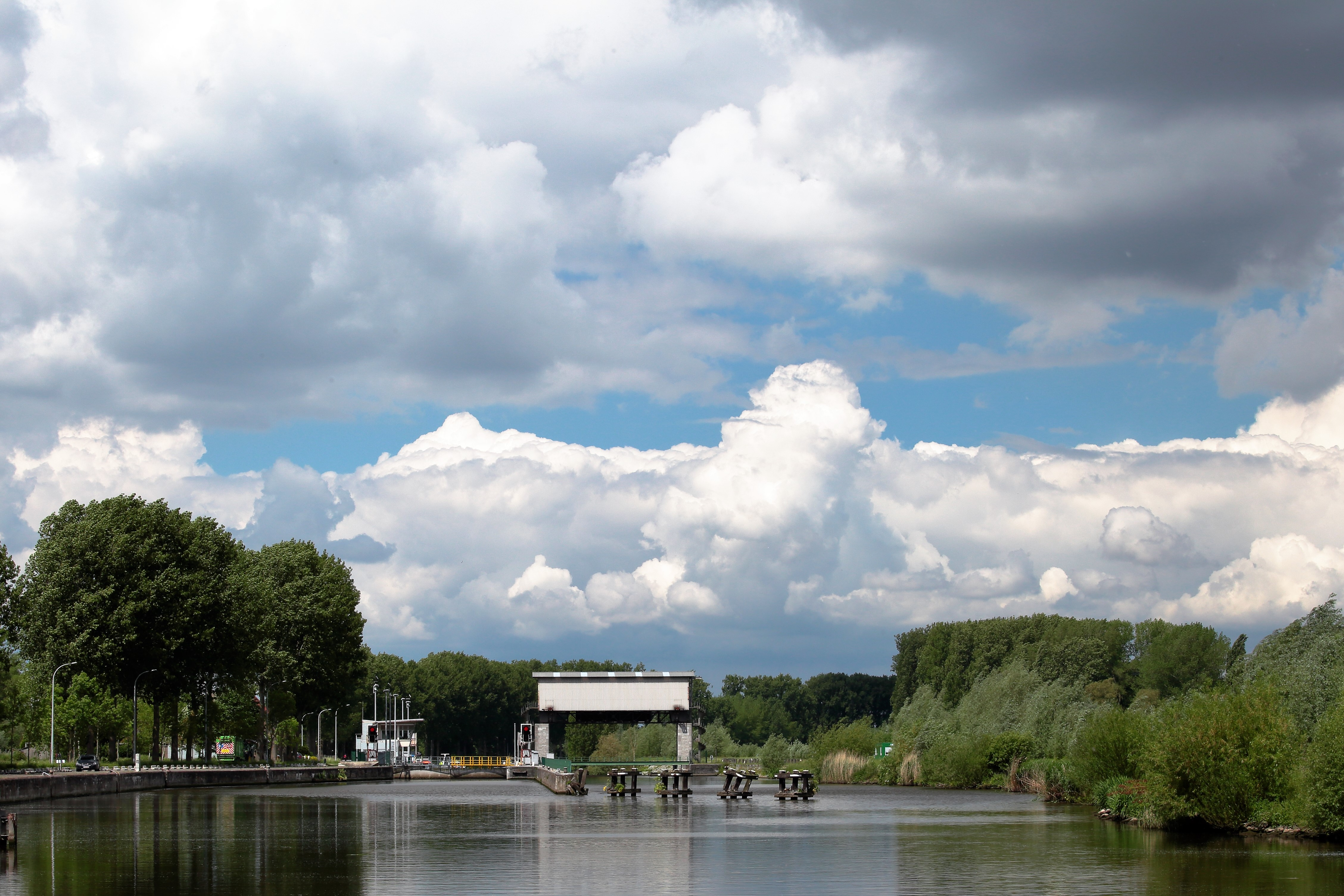 Hier worden de boten versluisd .